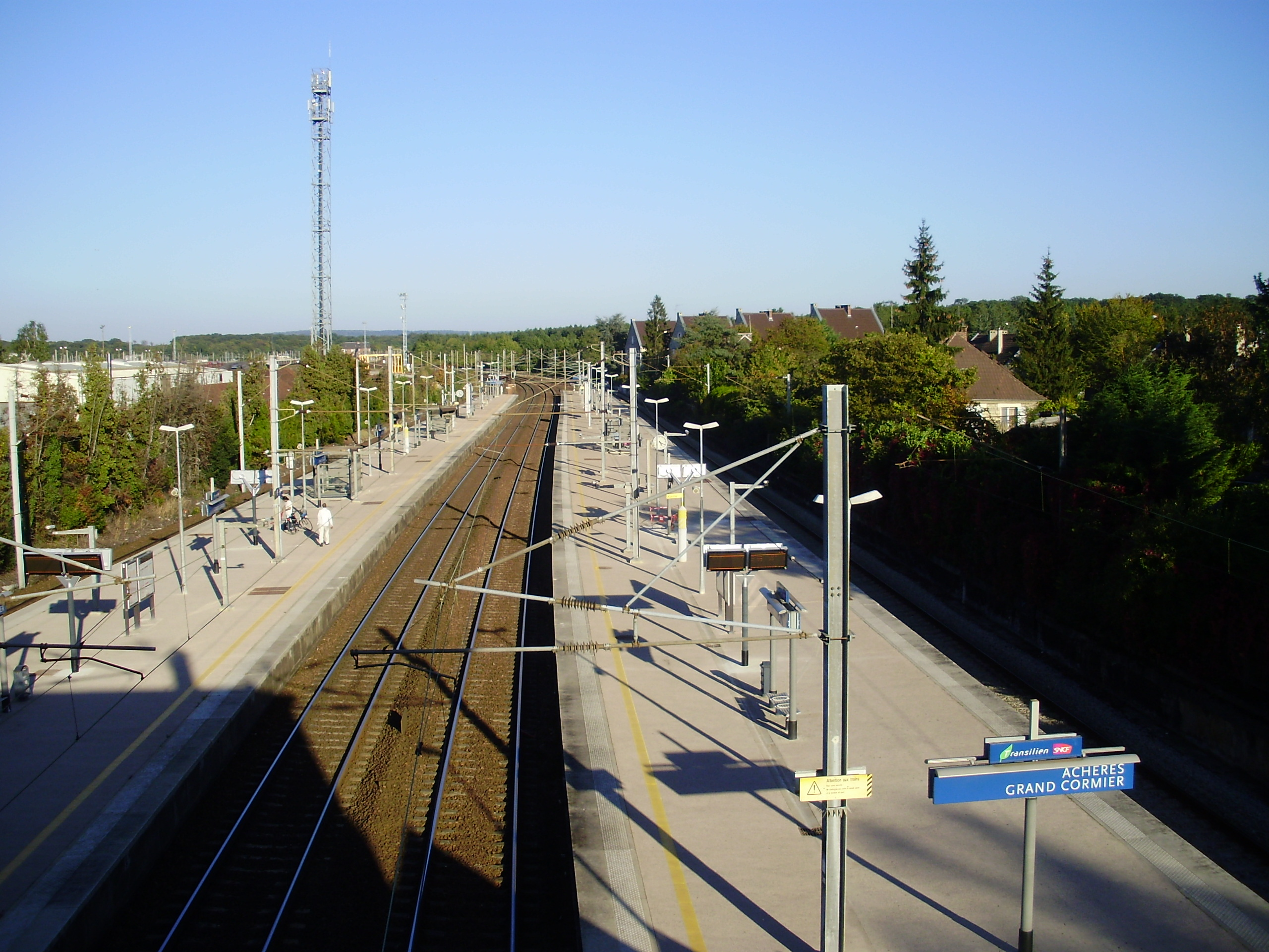 Gare d'Achères - Grand Cormier, à Saint-Germain-en-Laye, Yvelines, France (vue des quais en regardant vers Paris, depuis le passage supérieur attenant au bâtiment de la gare)